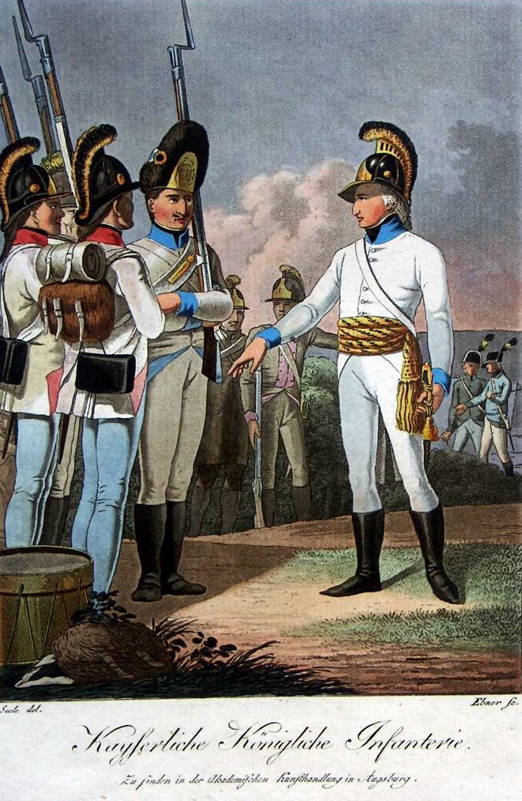 Infanterie autrichienne sous le Premier Empire. De gauche à droite : infanterie de ligne hongroise, grenadier allemand et officier d'infanterie allemande.